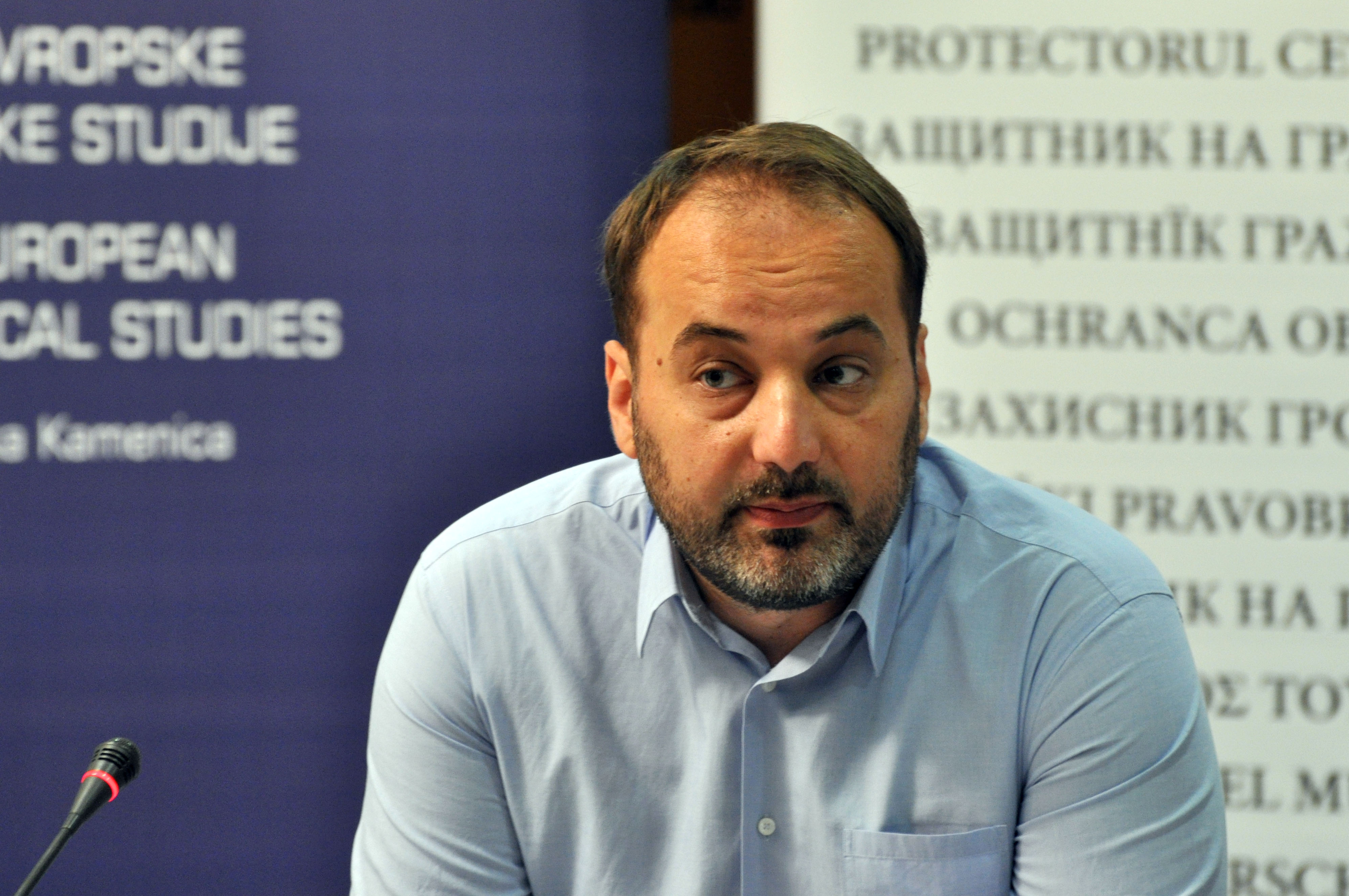 Saša Janković 2010